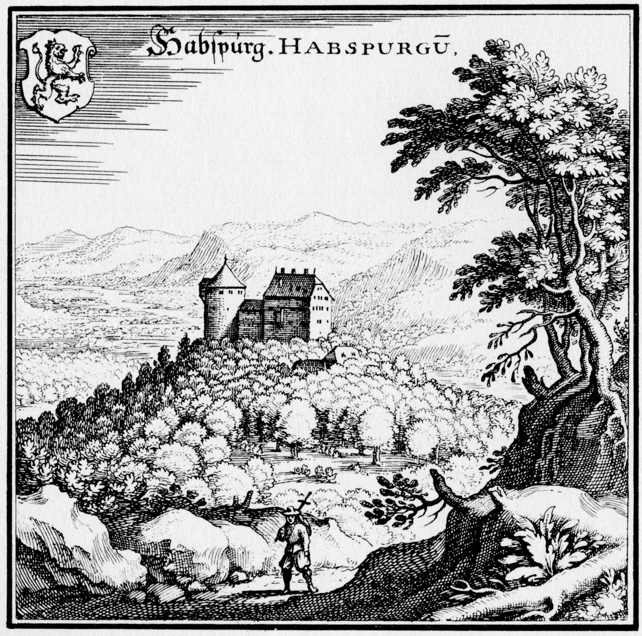 Ansicht der Habsburg im heutigen Kanton Aargau, Schweiz, 1642